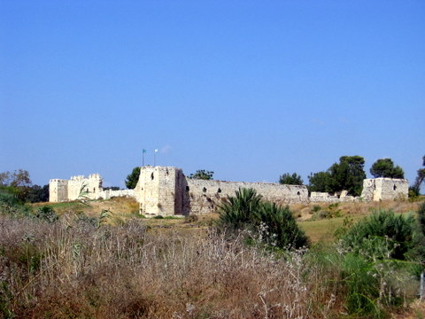 tel afek.